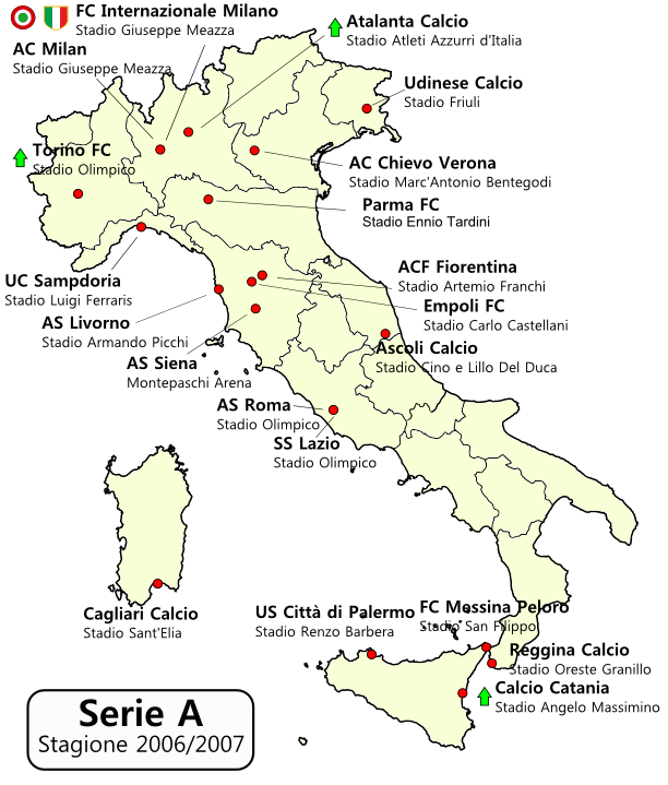 Distribuzione geografica squadre Serie A 2006-2007